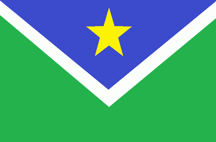 Bandeira do município de Vitória do Jari.